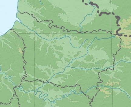 Carte topographique de la picardie